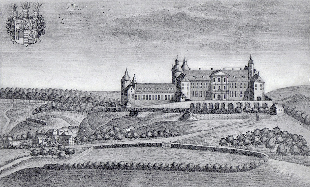 Stich mit der Abbildung des Schlosses Rochefort in Belgien nach einer älteren Zeichnung